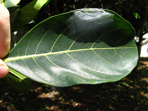 folha de jaqueira (Artocarpus heterophyllus).